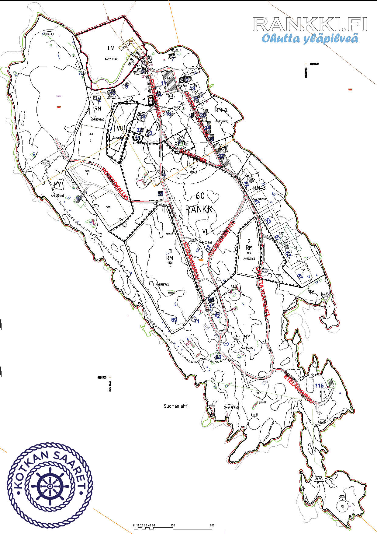 Voimassa olevassa karttaotteessa näkyy perustetut rakennuspaikat, vapaana olevat rakentamisen alueet RM sekä kaavoituksen yhteydessä perustetut osoitteet.